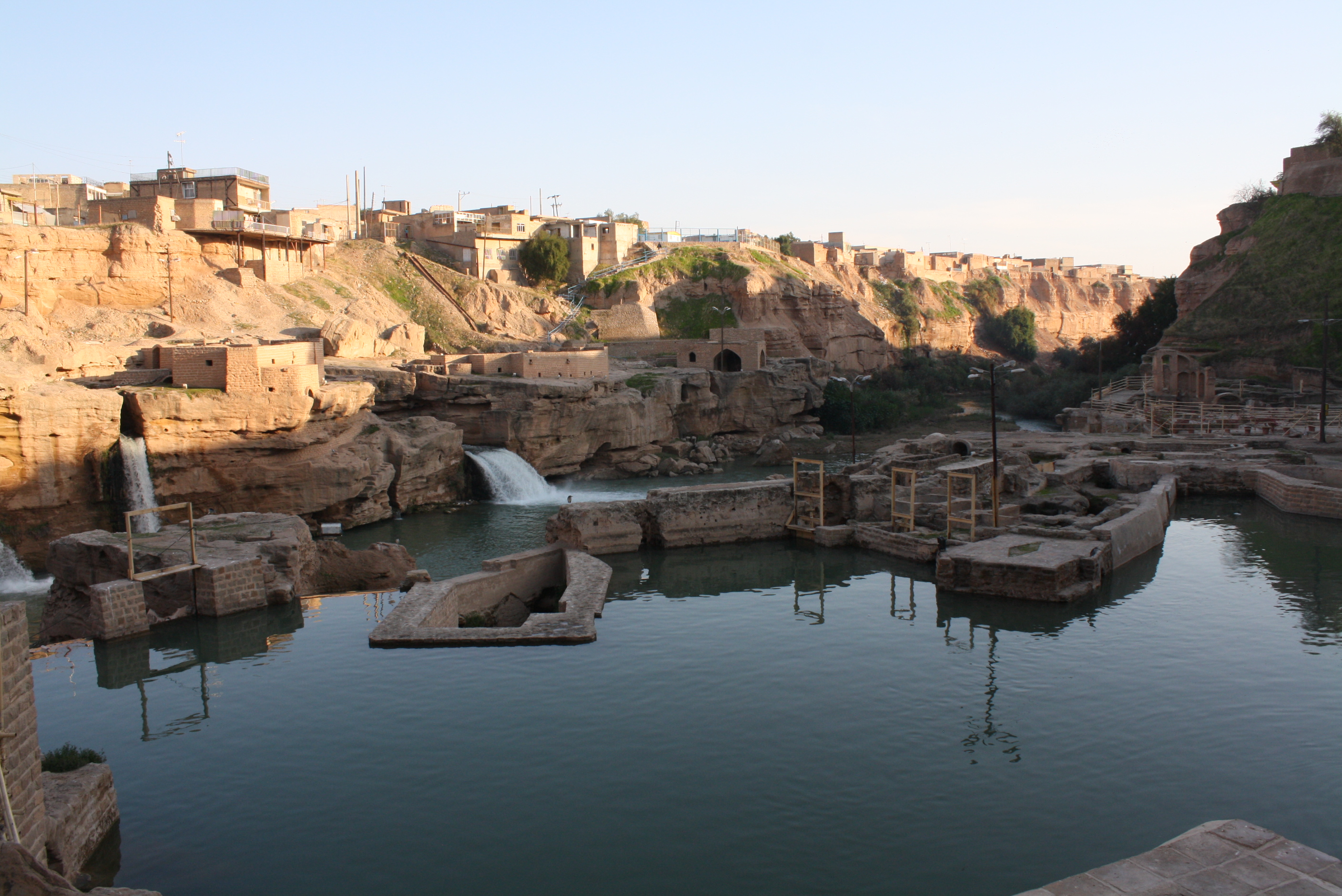 Шушнар (Иран). Царские мельницы(1).